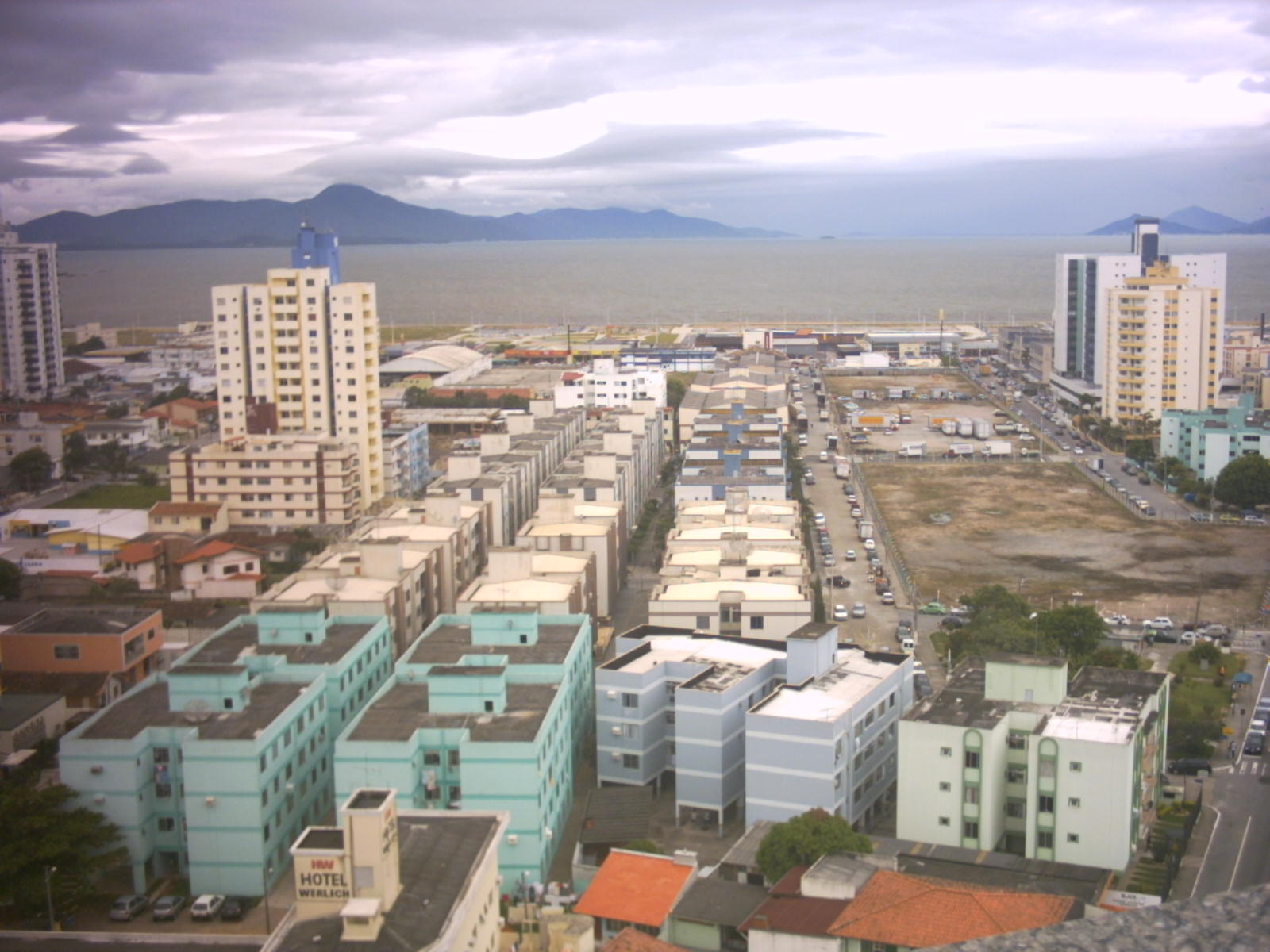 Vista para a beiramar de São José, Santa Catarina, Brasil